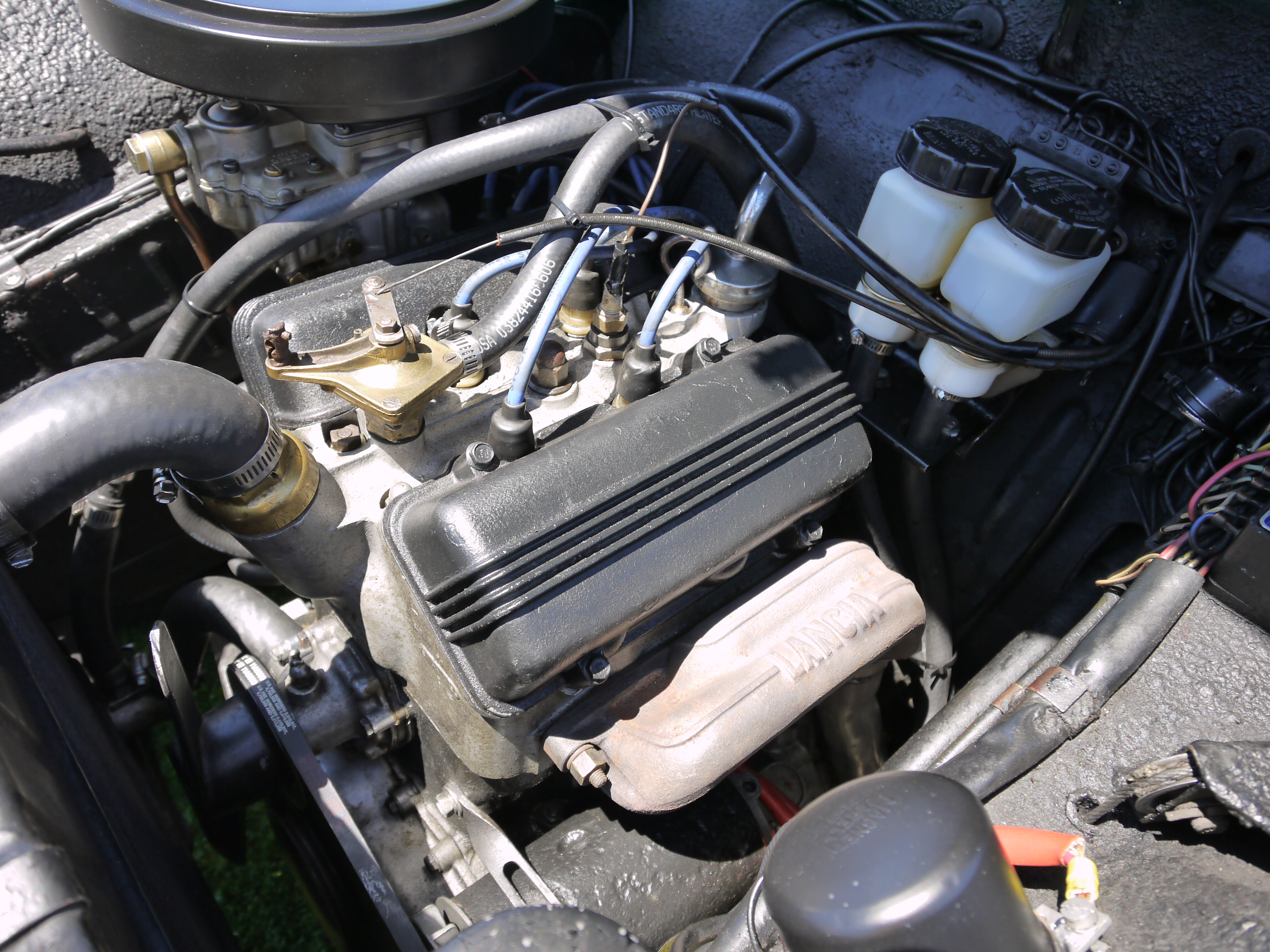 Lancia Appia Vignale convertible Photograph taken at 2010 Concorso Italiano.